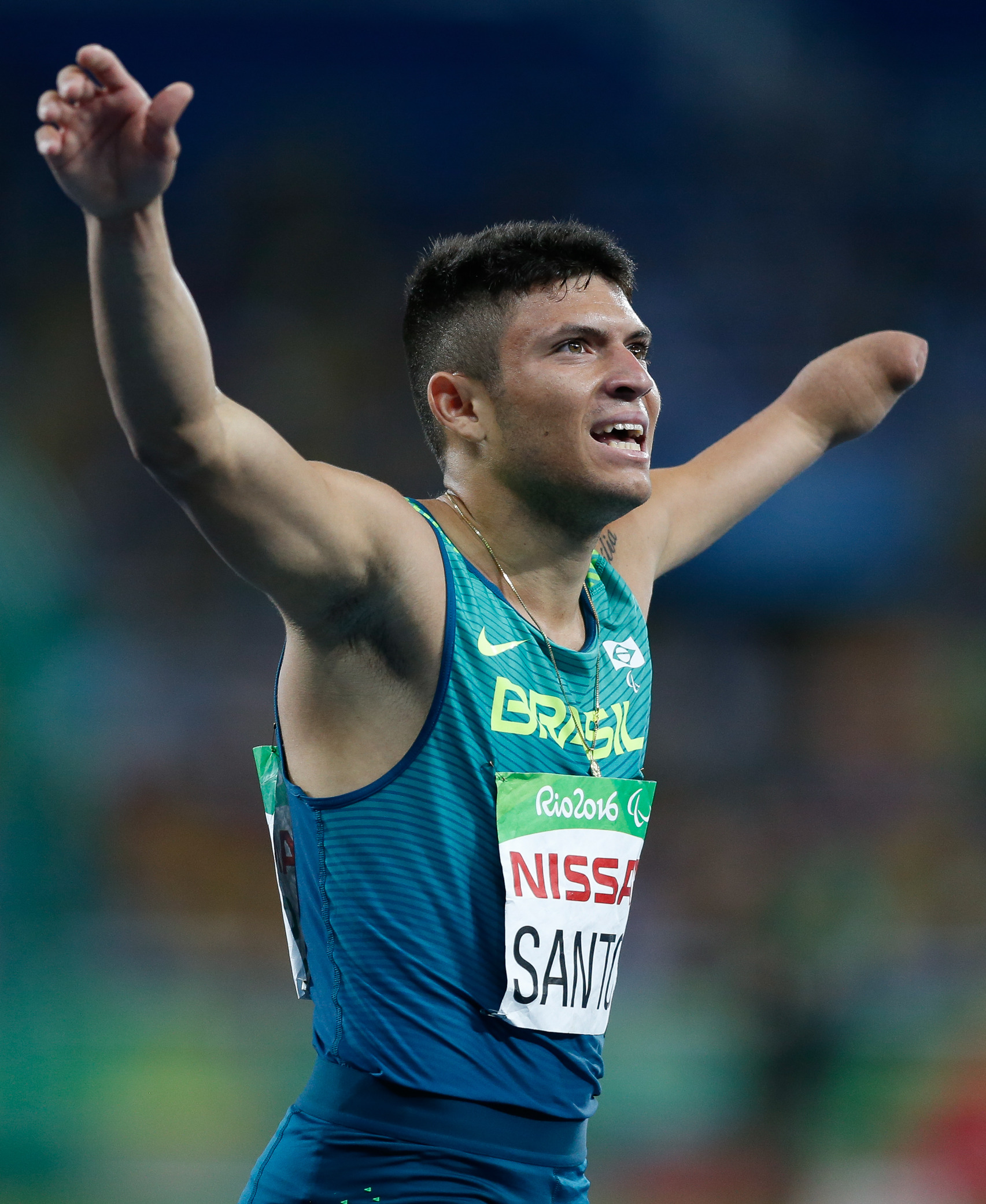 Rio de Janeiro - Petrucio Santos leva prata nos 400m T47 nos Jogos Paralmpicos Rio 2016. (Fernando Frazão/Agência Brasil)